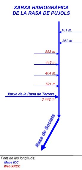 Mapa esquemàtic de la xarxa hidrogràfica de la Rasa de Pujols, al Solsonès.